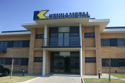 Kennametal Рувир Ruvir инструмент для металлообработки Производитель Токарного, Фрезерного инструмента